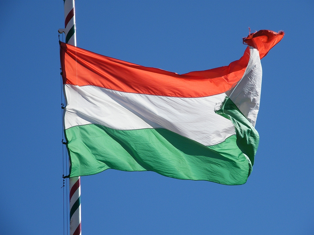 Erődrendszer romjai (Eger, Szervita utca, Dobó István utca, Bástya utca, Vécsey Sándor utca) This is a photo of a monument in Hungary. Identifier: 17237